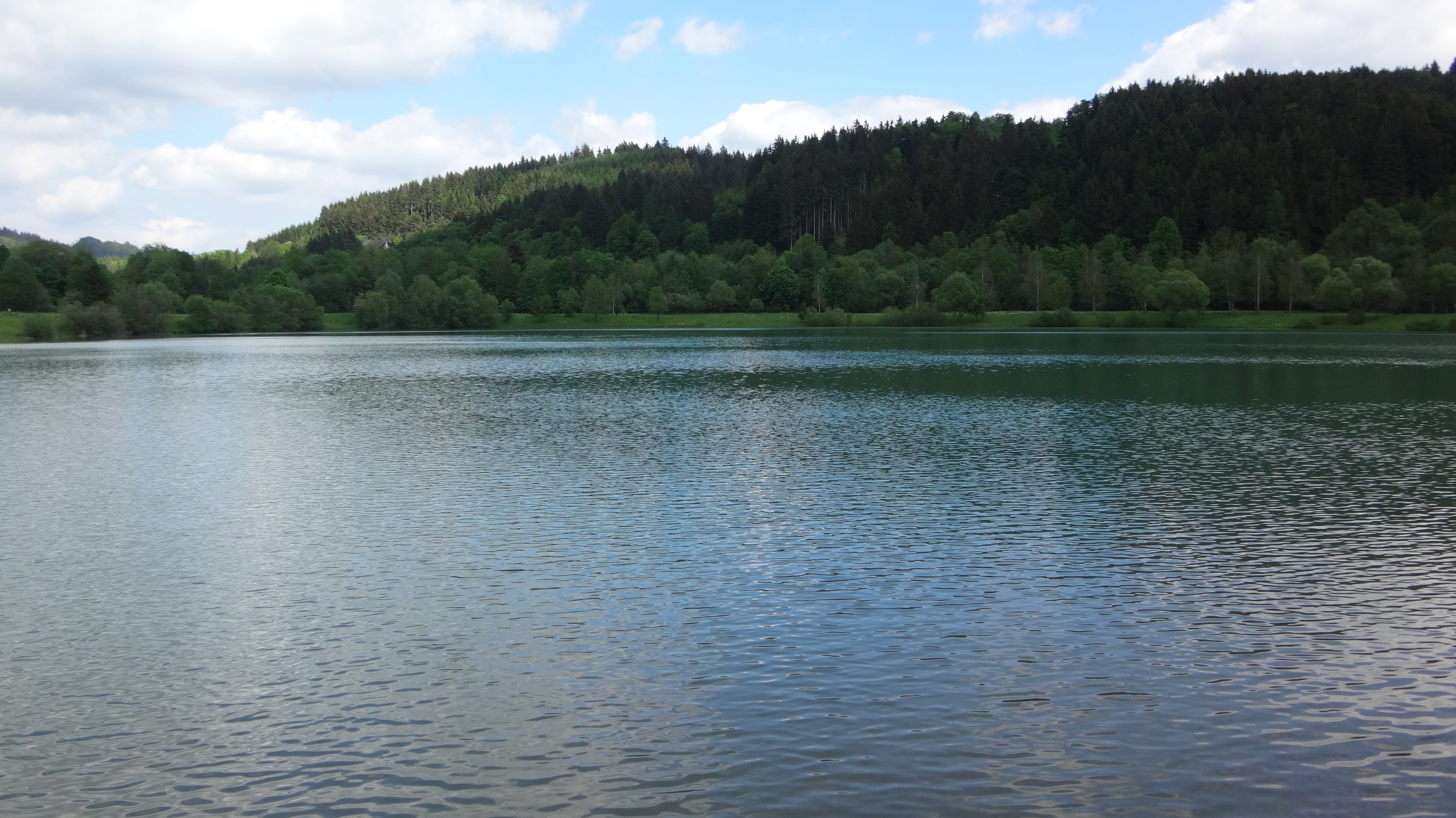 umělé jezero "BALATON" clouží k rekreaci a rybolovu